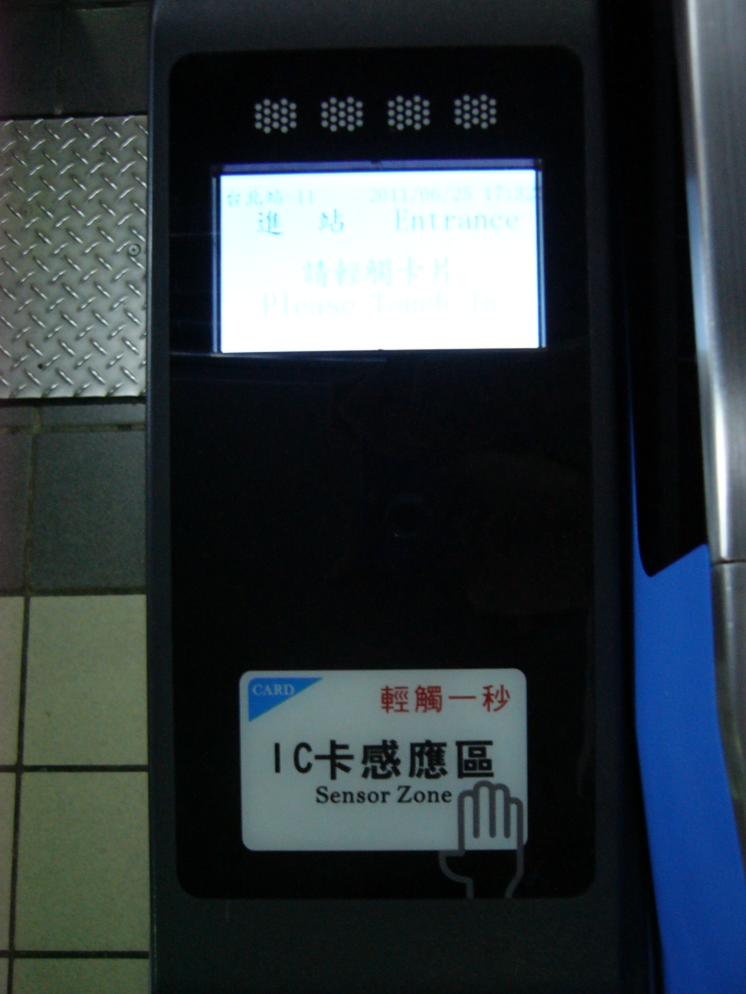 台鐵台北車站的Omron門檔式閘門的IC卡感應區